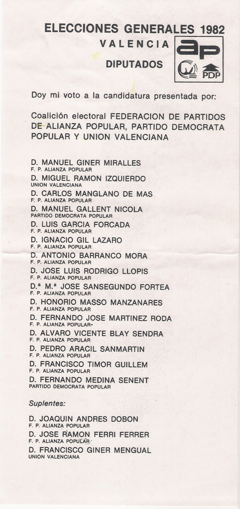 Papeleta elecciones generales de 1982, de la coalición AP PDP UV por la provincia de Valencia, al Congreso